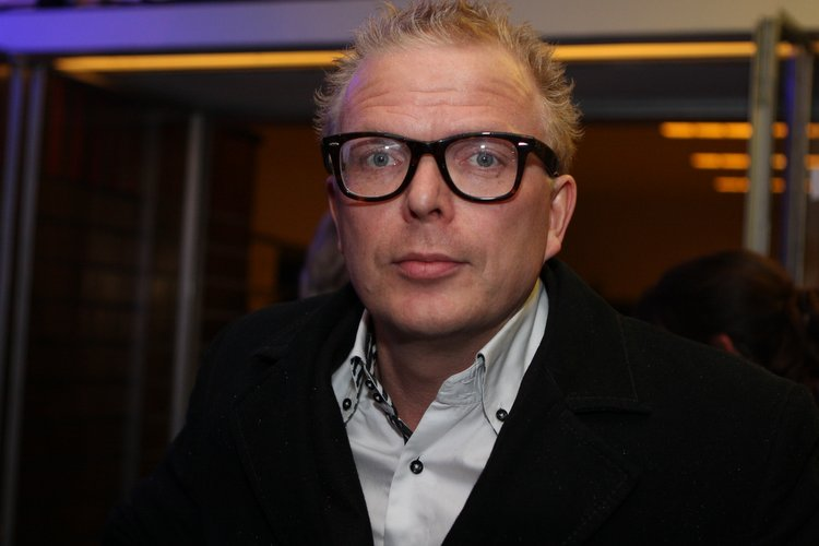 Jan Roos, Nederlands politicus, columnist en journalist